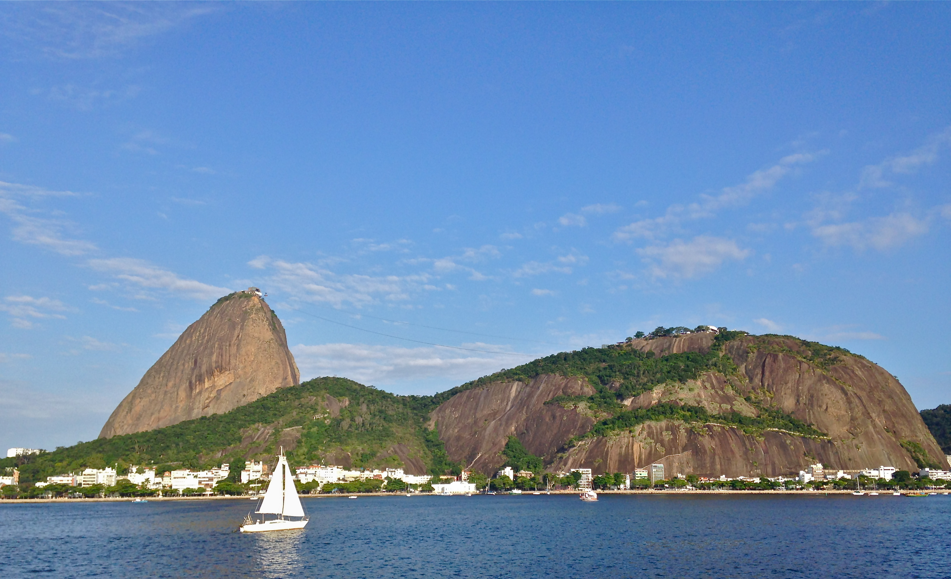 Foto tirada da Enseada do Flamengo